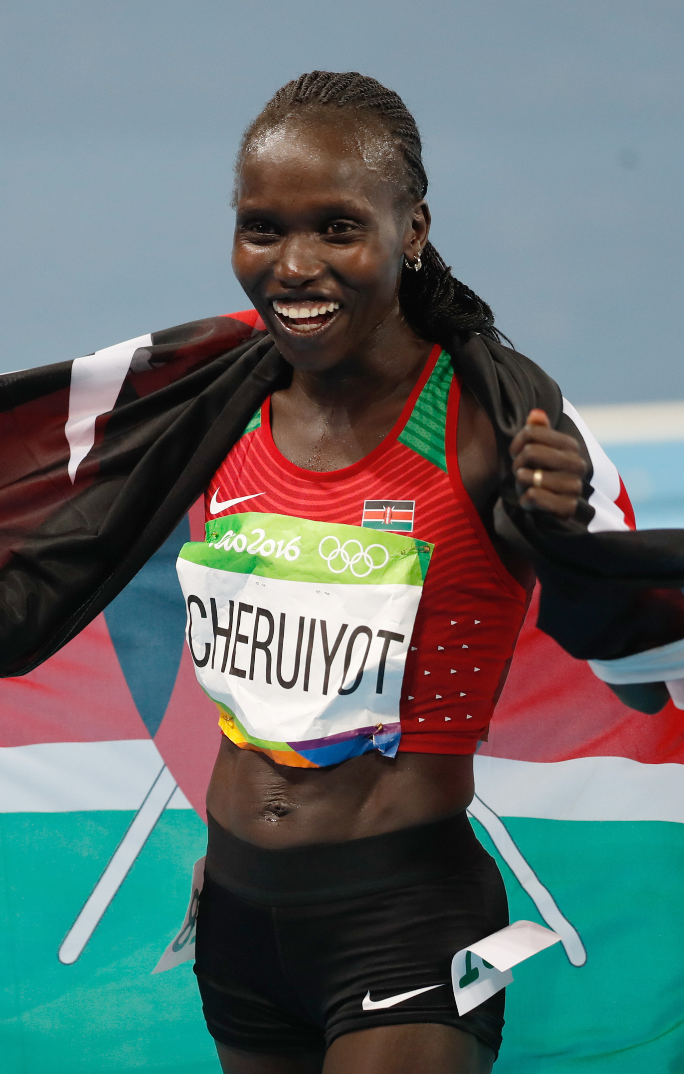 Rio de Janeiro - A queniana Vivian Jepkemoi Cheruiyot vence final e bate recorde olímpico dos 5 mil metros nos Jogos Rio 2016, no Estádio Olímpico (Fernando Frazão/Agência Brasil)